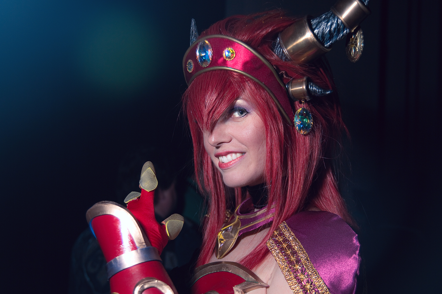 Full gallery here